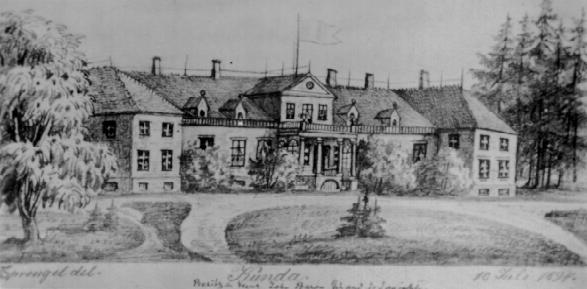 Kunda mõis